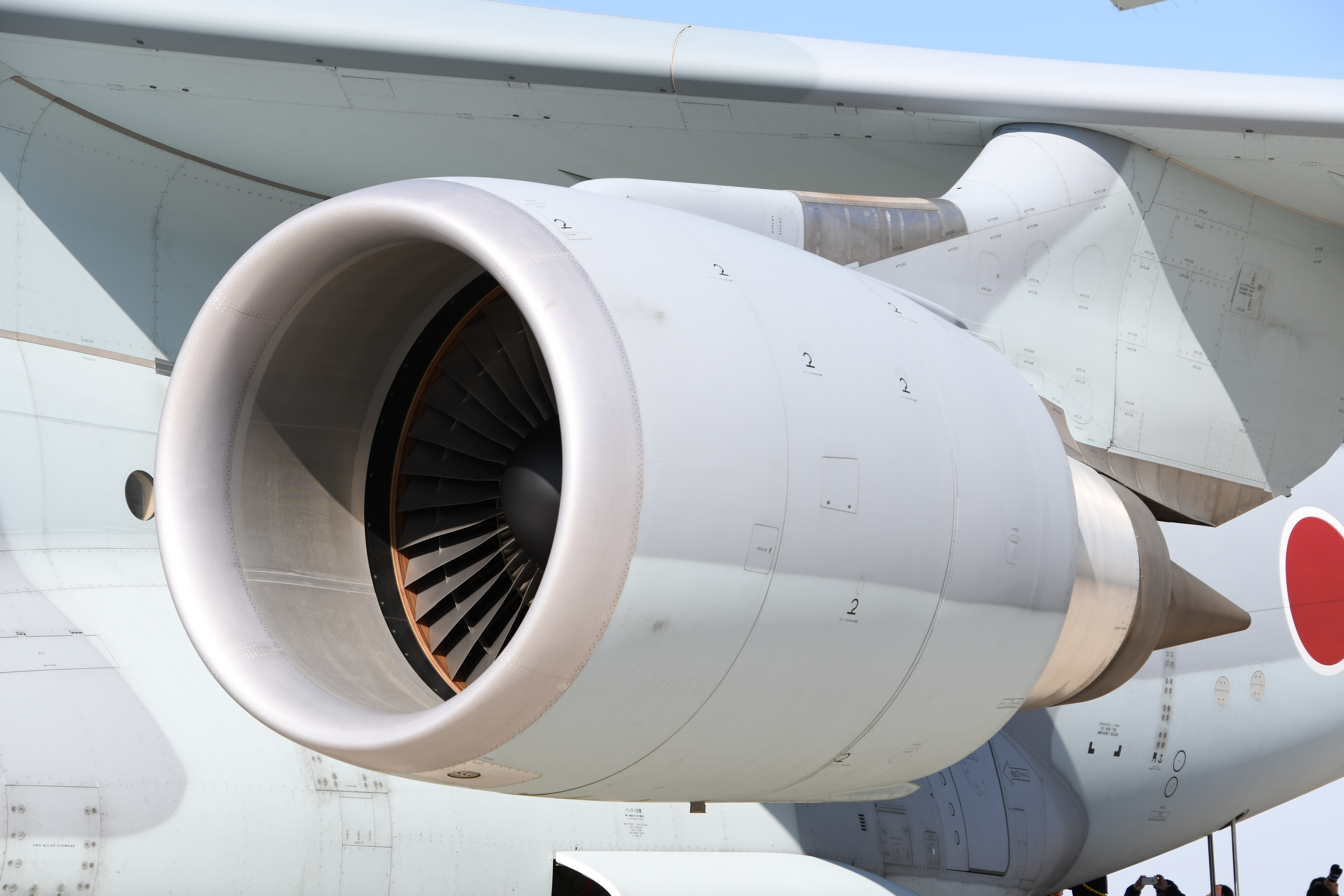 航空自衛隊 C-2輸送機（78-1205号機） CF6-80K1Fターボファン・エンジン（左主翼側） 左前面。2018年3月3日 小牧基地にて。